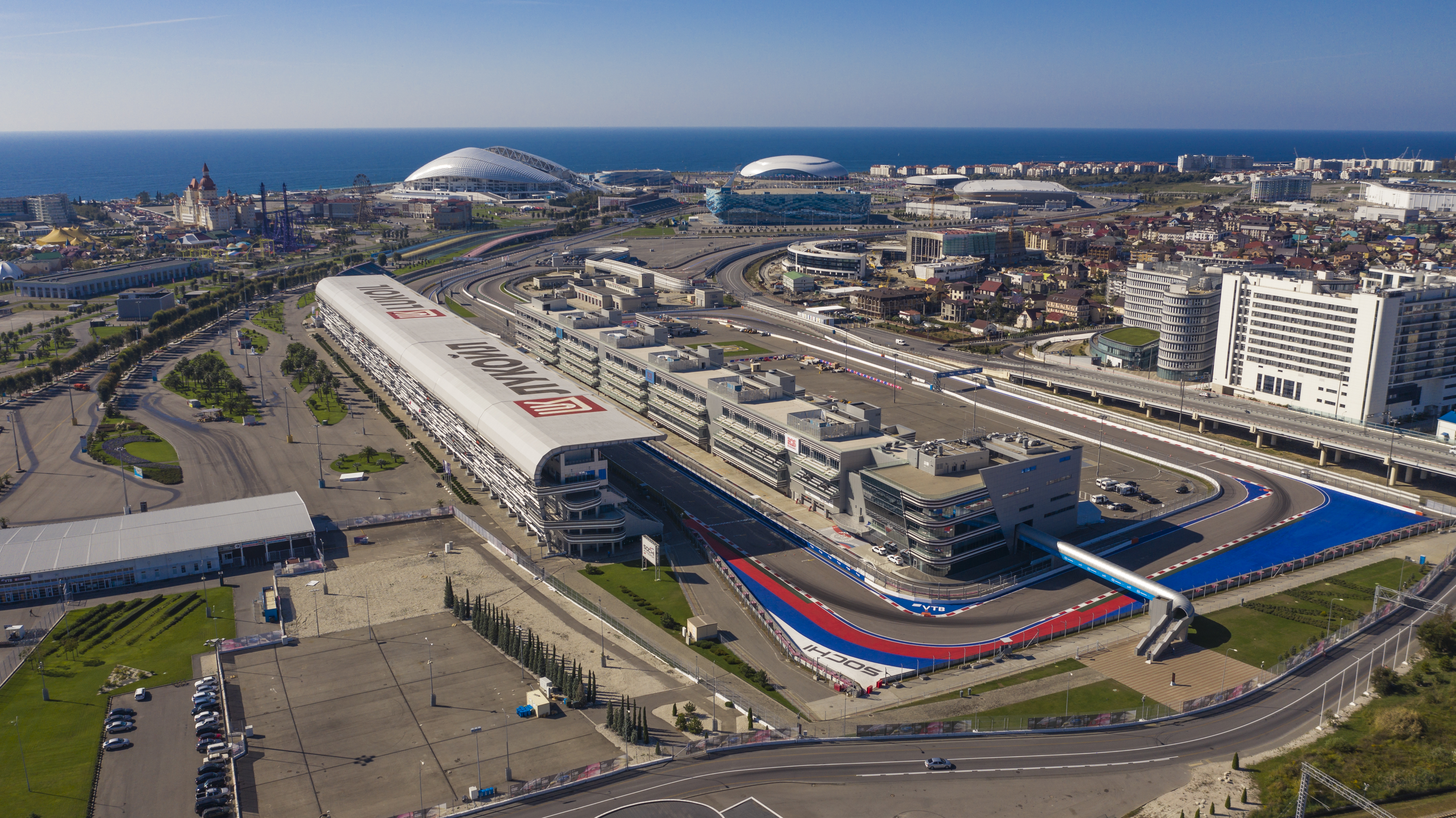 Blick auf die F1 Rennstrecke von Adler (Sotschi)